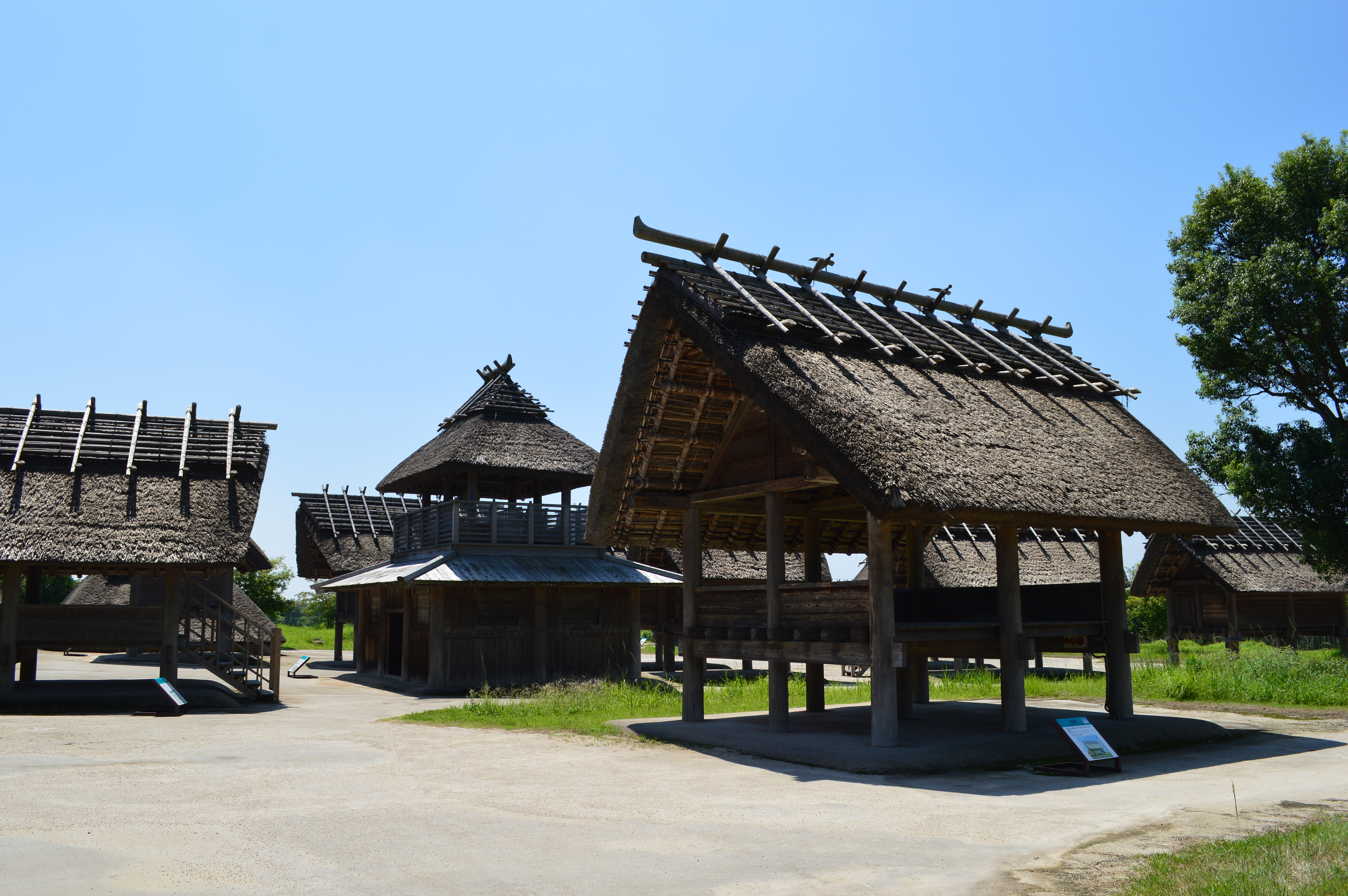 吉野ヶ里遺跡 市